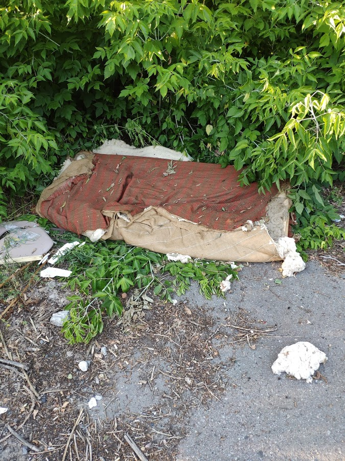 Артилерійські склади Полтава викинутий матрас